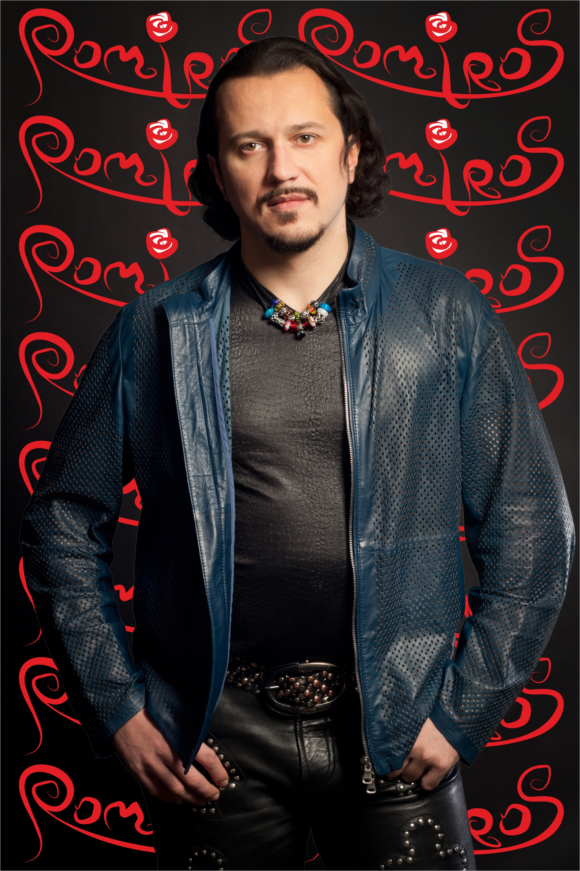 ROMIROS - известный латвийский исполнитель латиноамериканской музыки из города Риги – Роман Якубов.